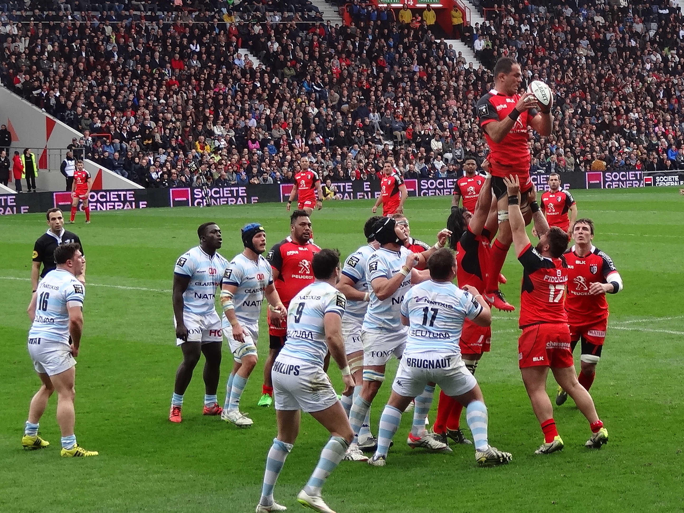 Touche lors du match Stade Toulousain - Racing 92 le 17 avril 2016